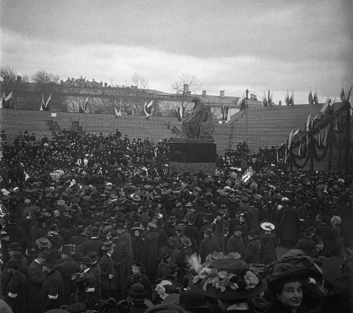 Открытие памятника Гоголю в Москве 26 апреля 1909 года.